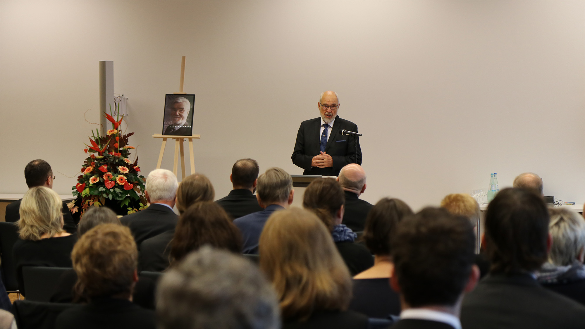 Gedenkfeier für Ulf Stahl am 16.10.2019